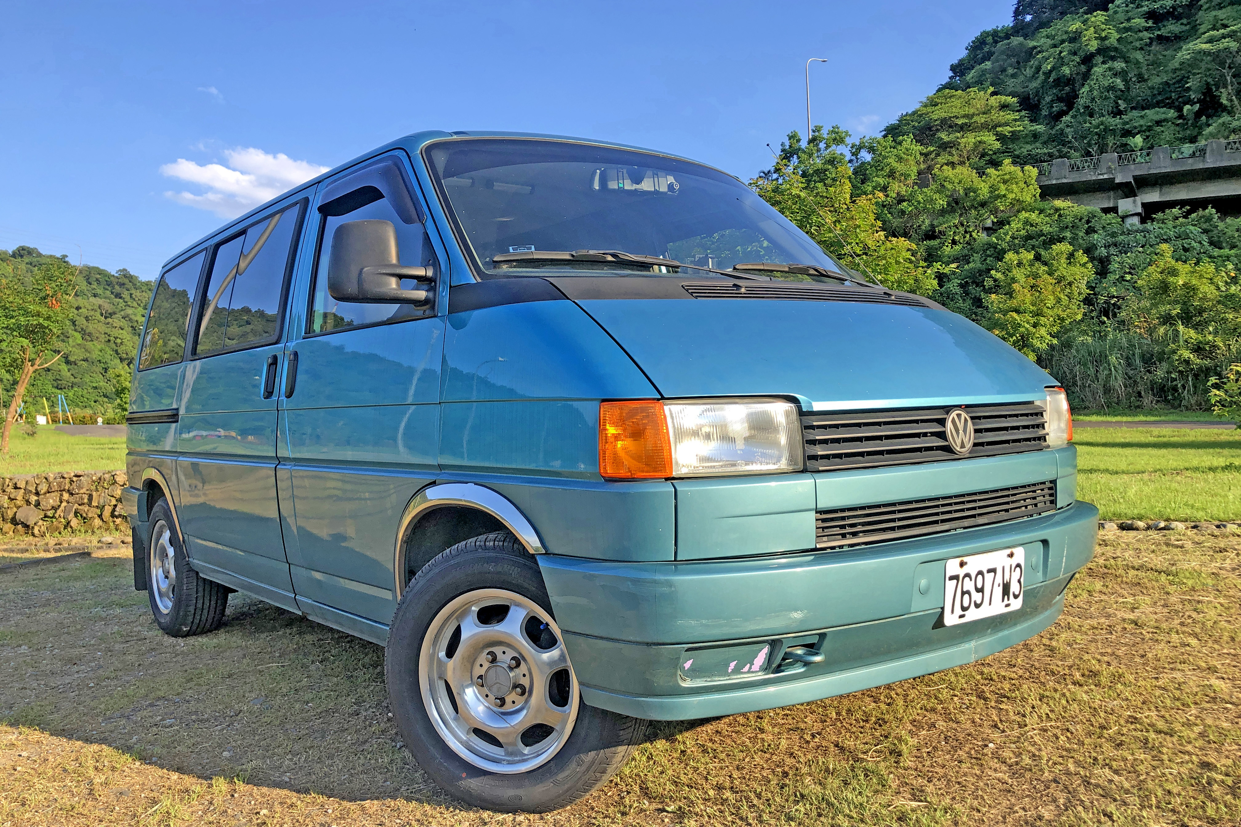 中文（台灣）: 1994年到2003年，德國大眾與台灣慶豐銀行合資慶眾汽車，當中生產了十年的福斯T4廂型車